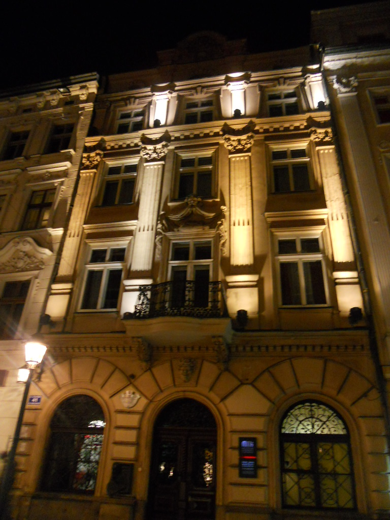 Dom Jana Matejki w Krakowie nocą.